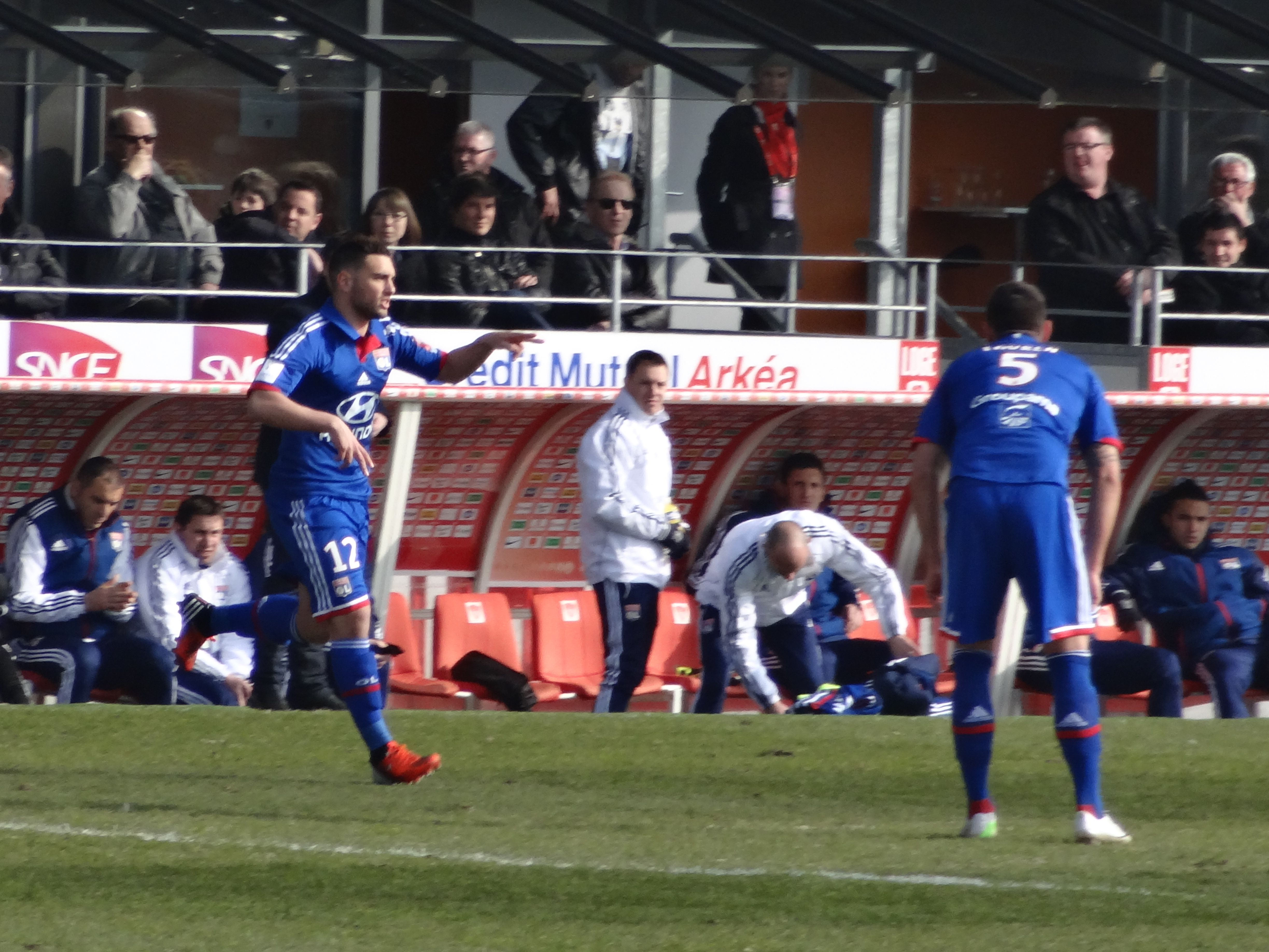 Match de football (Ligue 1) entre le Stade brestois 29 et l'Olympique lyonnais, le 3 mars 2013